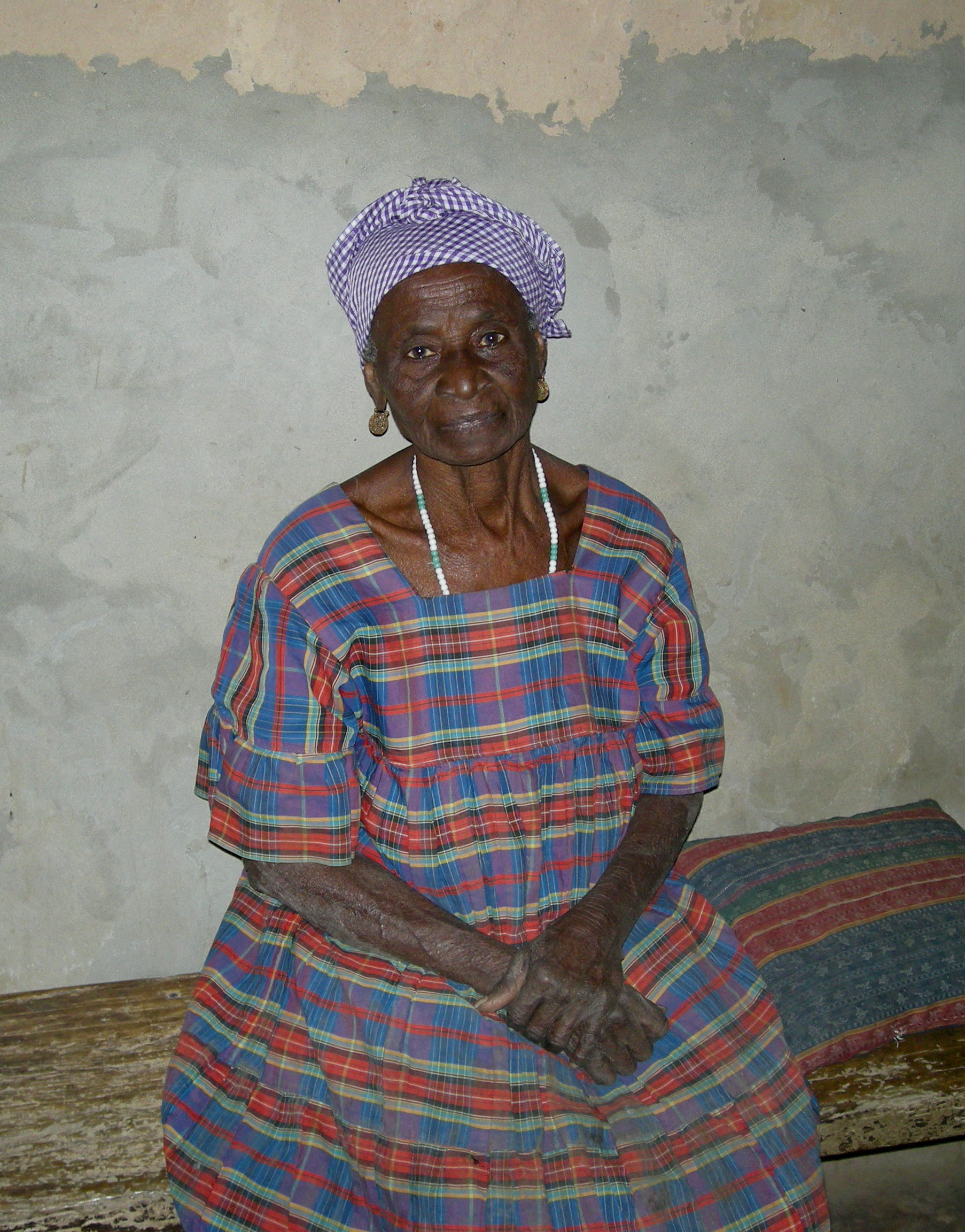 L'une des doyennes de Mlomp (Casamance, Sénégal). Sa date de naissance est inconnue, mais elle totaliserait 88 ans de mariage en 2008.